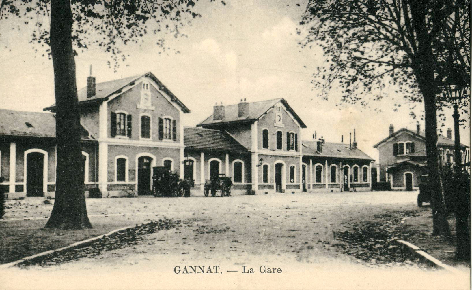 Carte postale ancienne, sans mention d'éditeur : GANNAT - La Gare